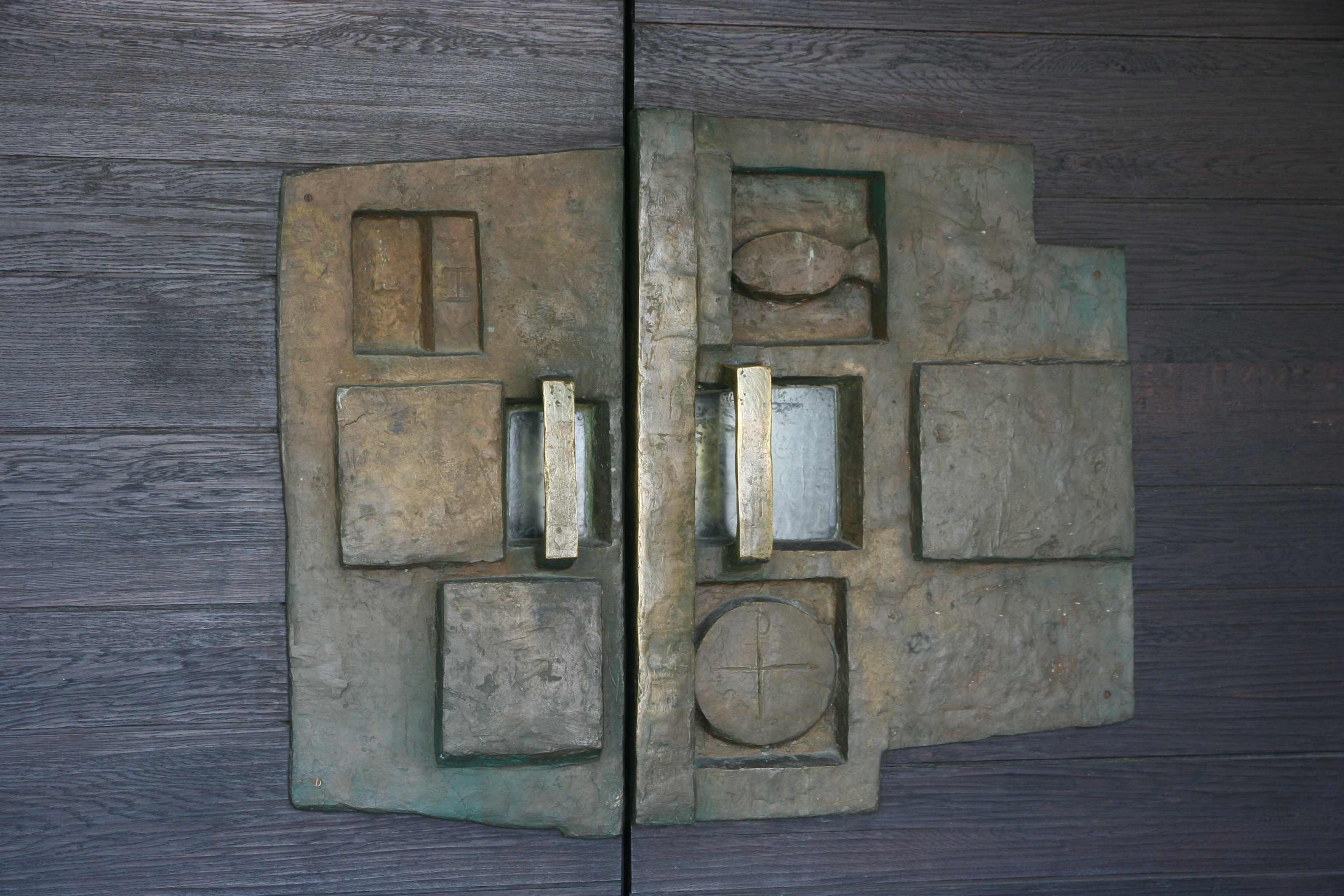 Römisch-katholische Pfarrkirche Christ König Biel/Bienne